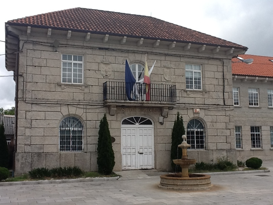 Casa do Concello do Irixo